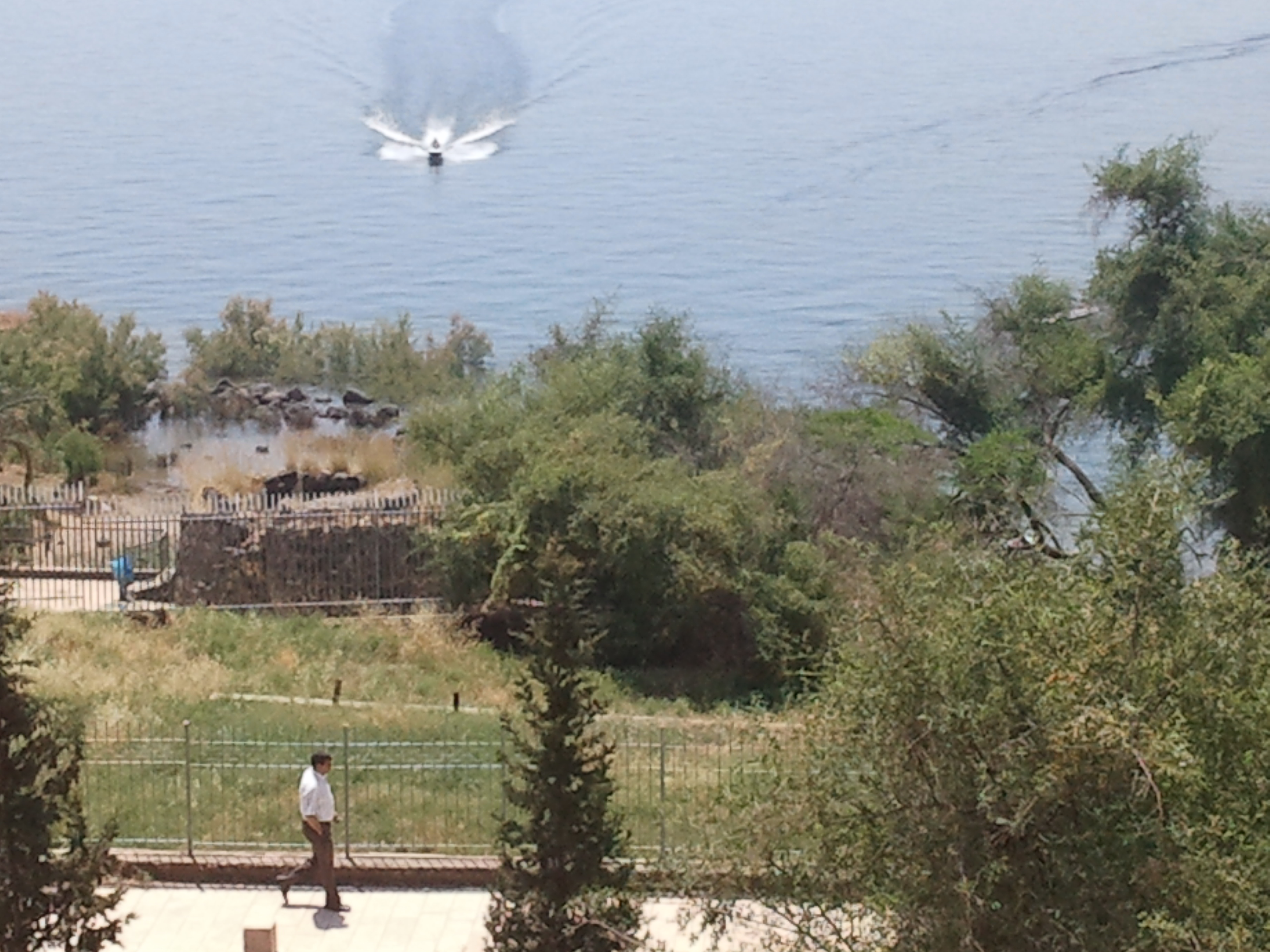 Ein Eyov, Spring near Capernaum Israel עין איוב, מעיין ומפל ליד הכנרת, ליד הגן הלאומי כפר נחום מראה כללי של אזור המעיין